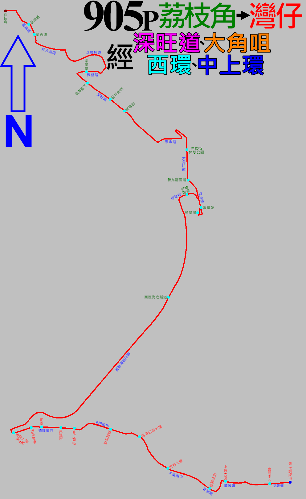 中文（香港）: 過海隧巴905P線的走線圖